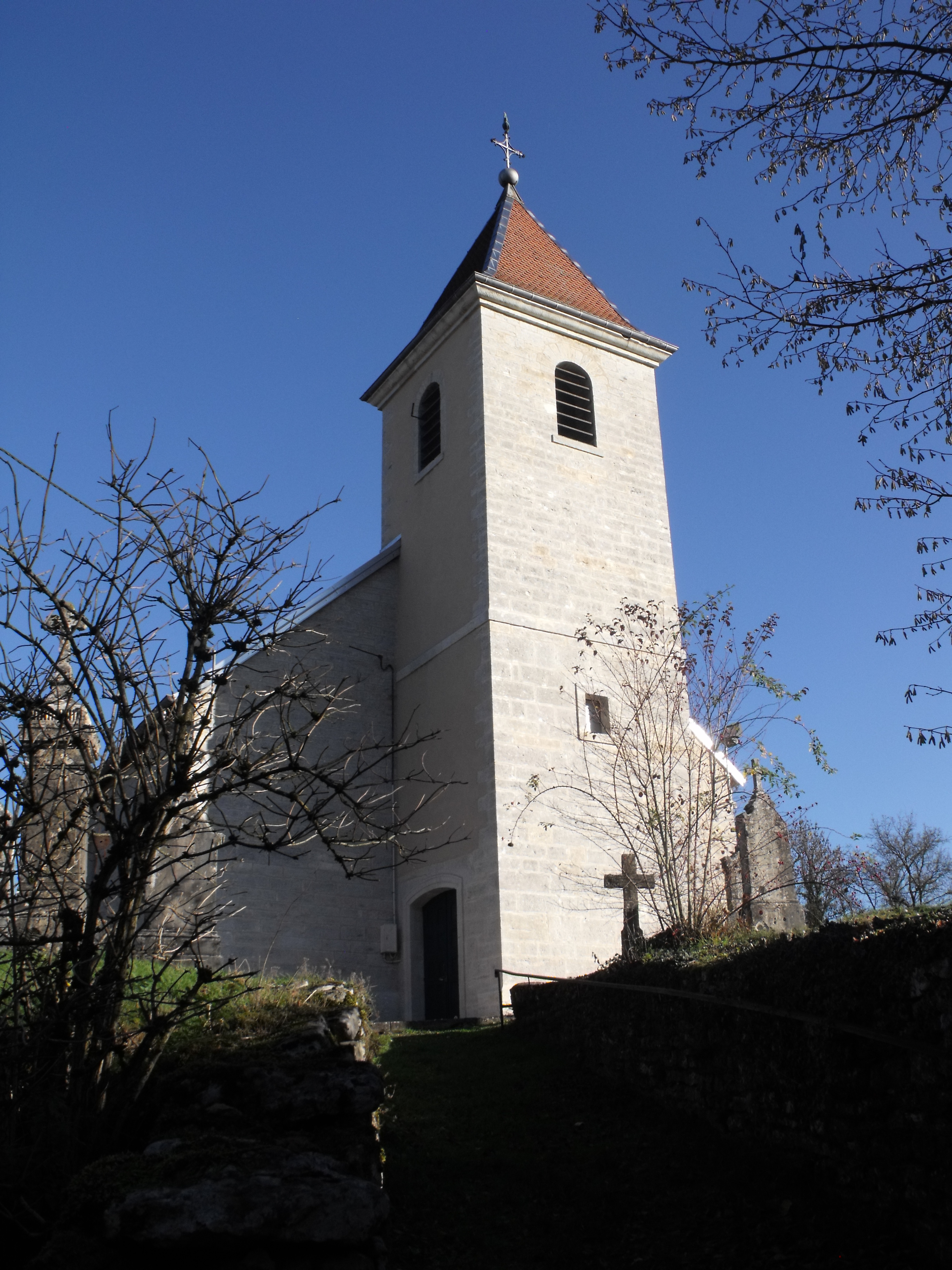 Eglise d'Accolans, Doubs, France